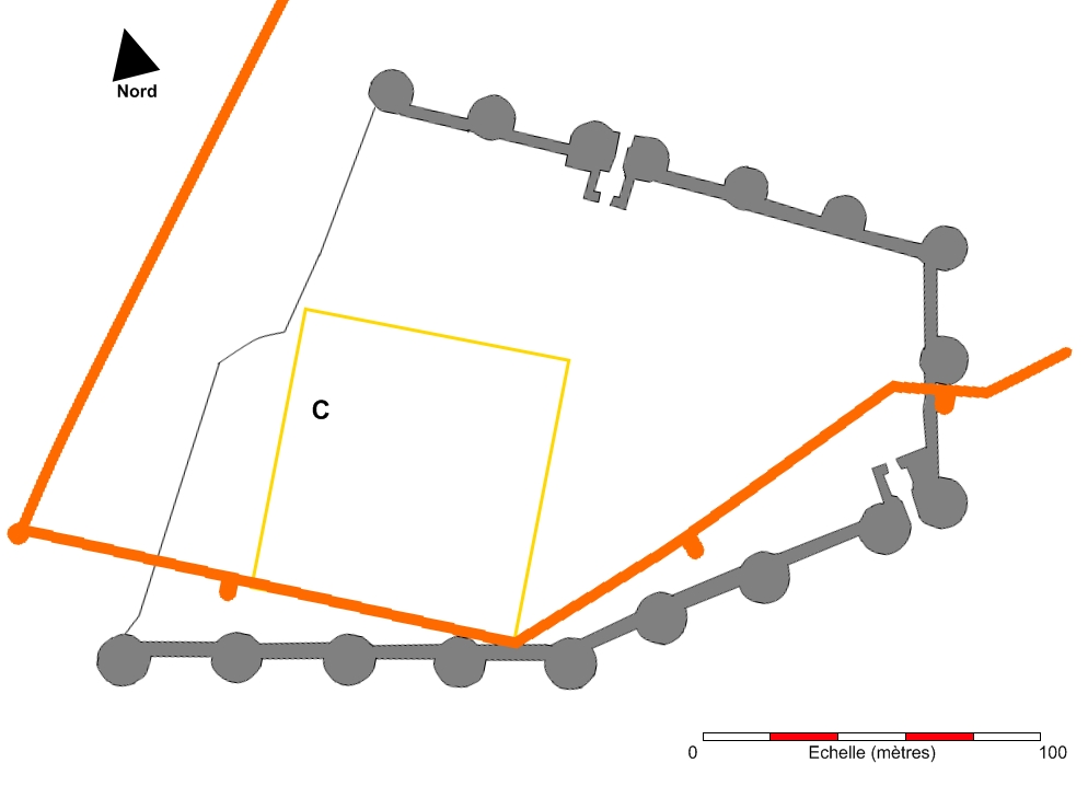 Plan des vestiges préhistoriques et antiques du château d'Angers : C : Emplacement du cairn néolithique. Jaune : Emplacement de l'ancienne terrasse antique. Orange : Tracé de l'enceinte gallo-romaine.